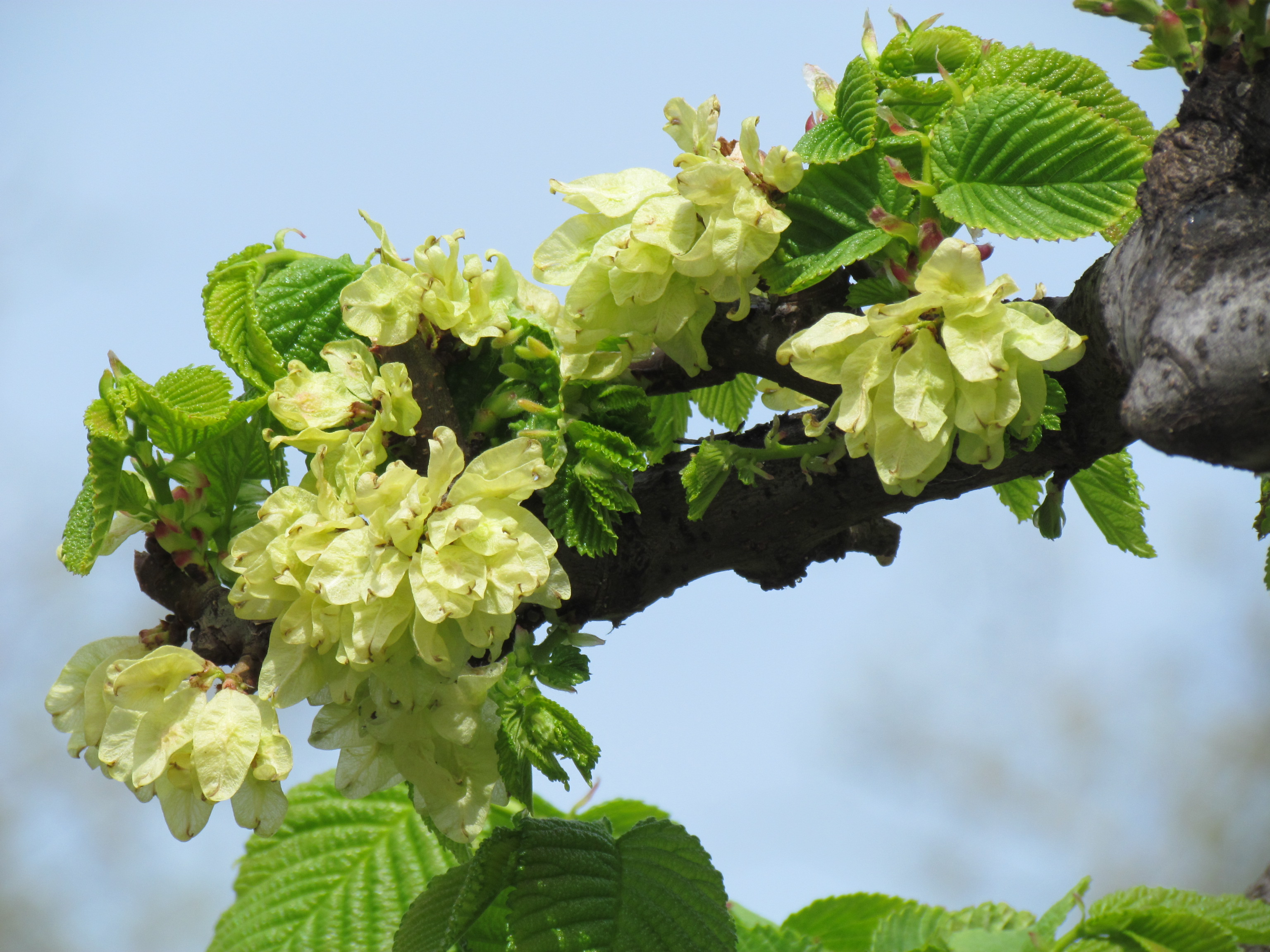 Кролате орашице U. glabra 'Pendula'(Парк Ћирило и Методије - Београд, фото: Михаило Грбић)